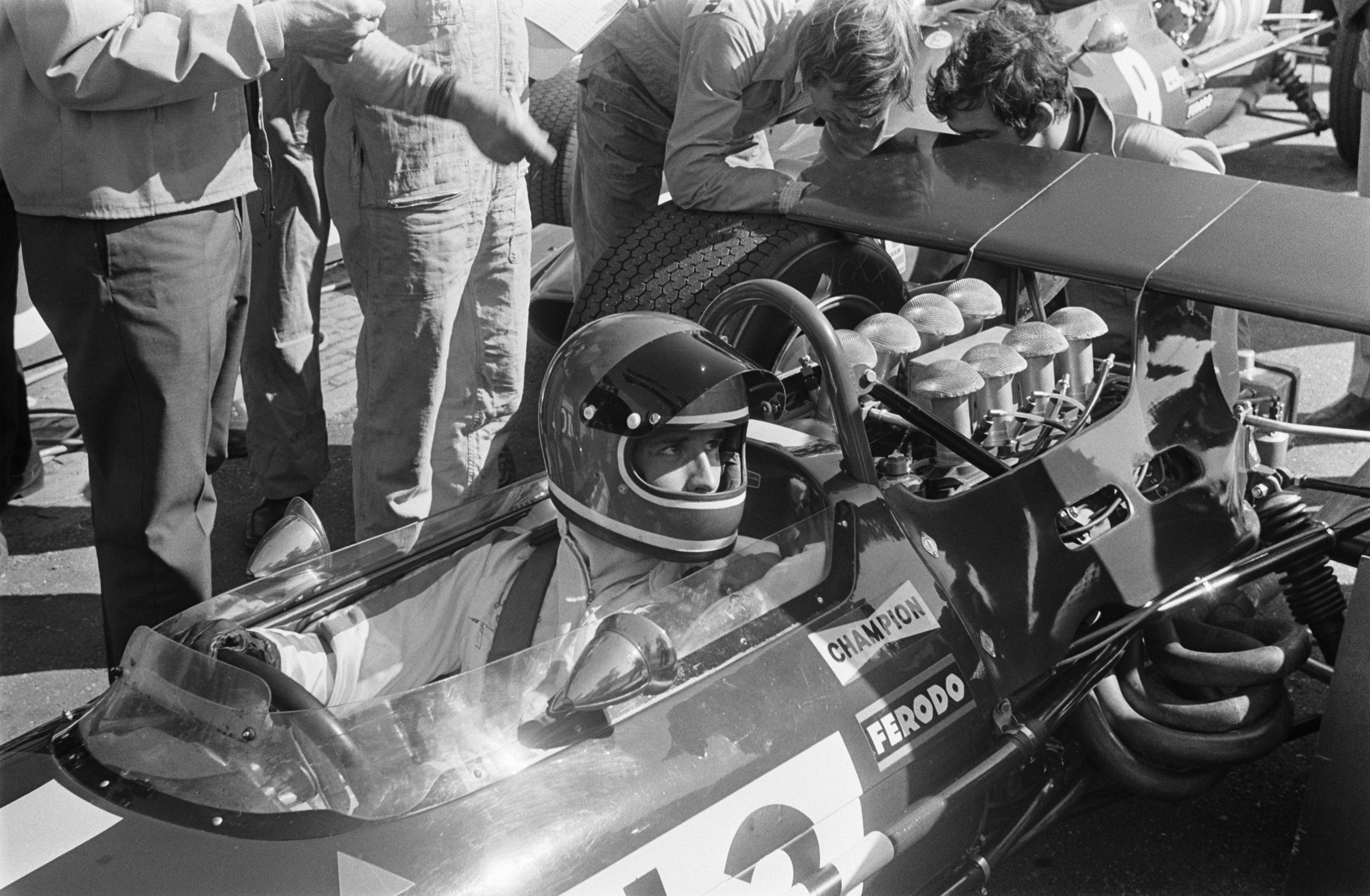 Jacky Ickx in zijn Brabham/Ford in de pitstraat.